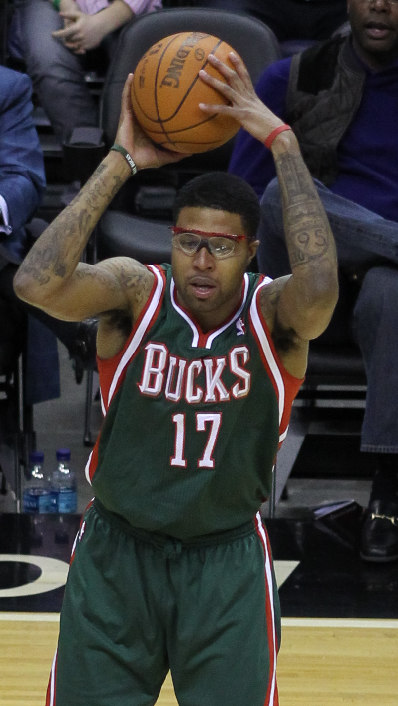 Wizards v/s Bucks 03/08/11